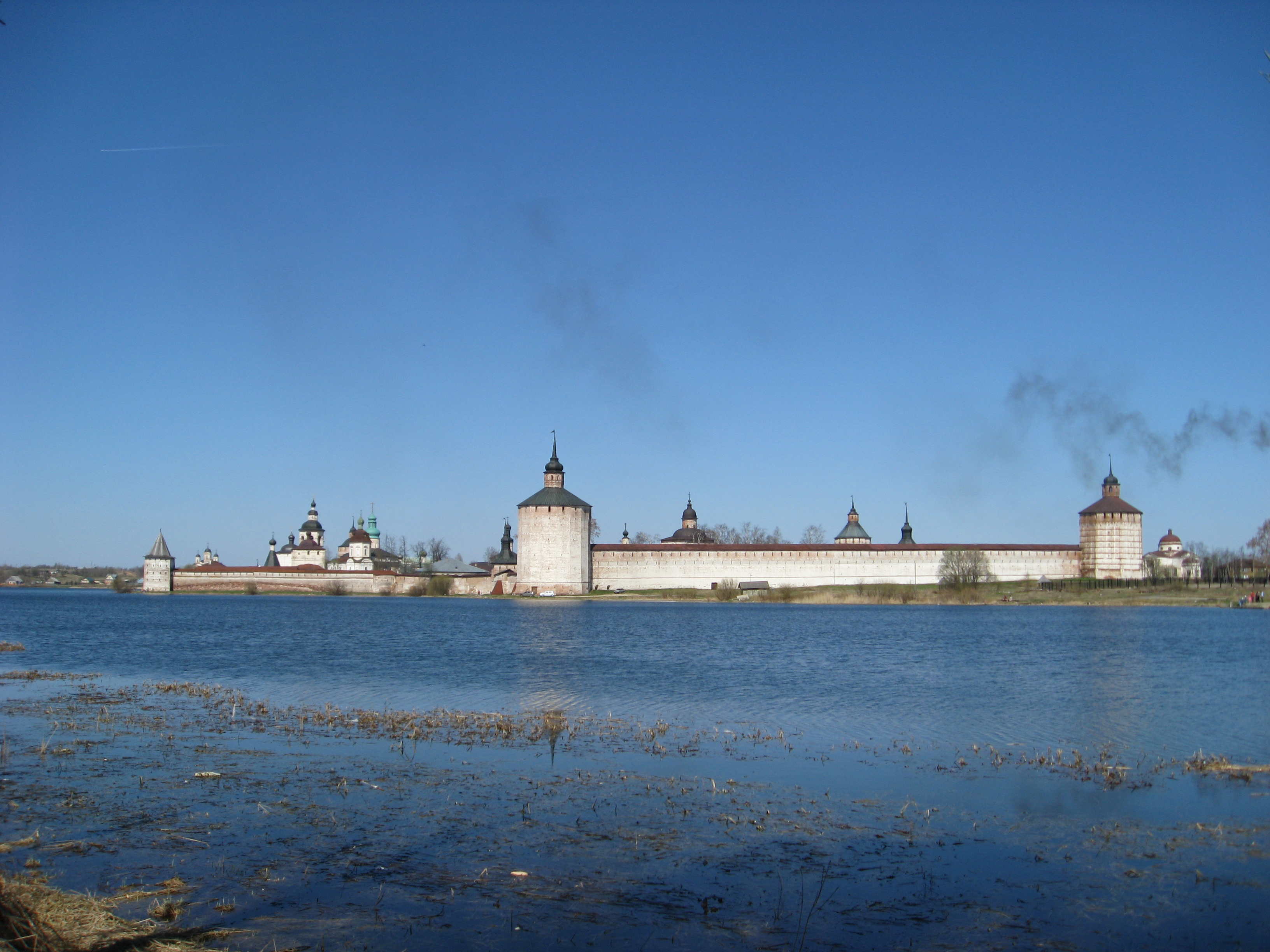 Ансамбль Кирилло-Белозерского монастыря (историко-архитектурный и художественный музей-заповедник) (Вологодская область, Кириллов, город Кириллов)